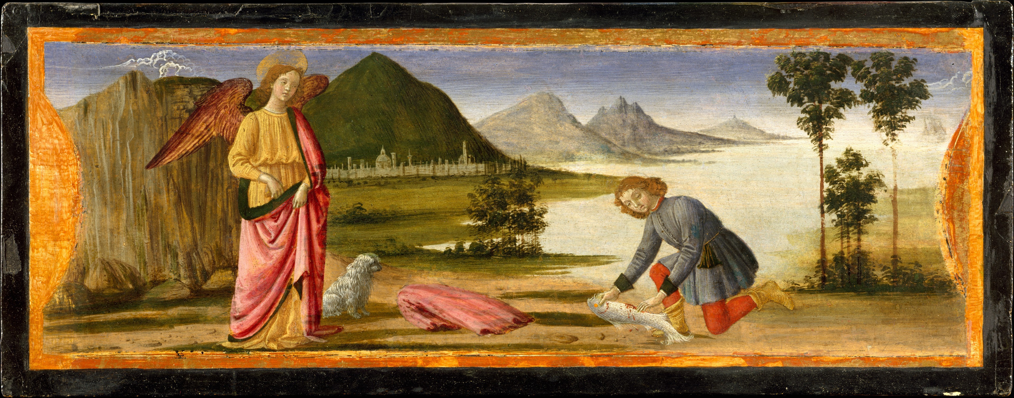 David ghirlandaio, tobiolo e l'angelo raffaele